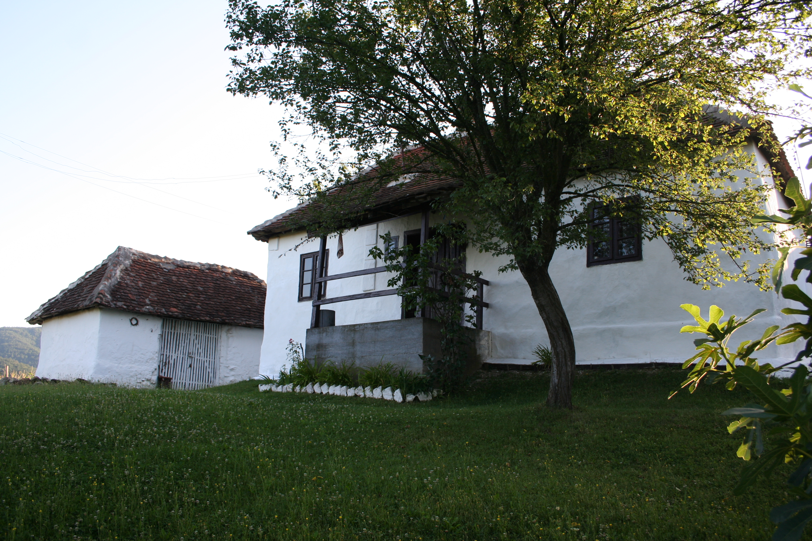 Okućnica Pavlović Jevrema, Trbosilje